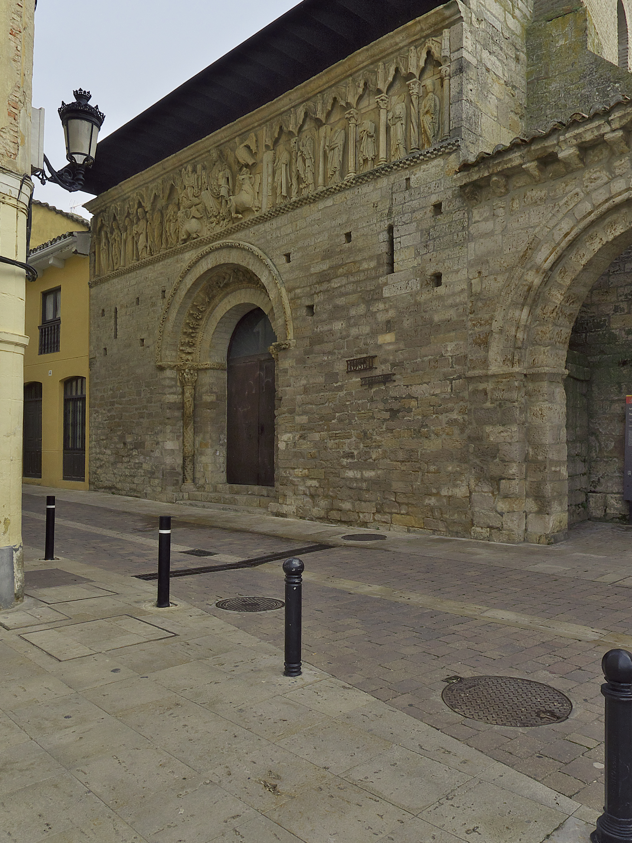 Fachada occidental (s. XII)